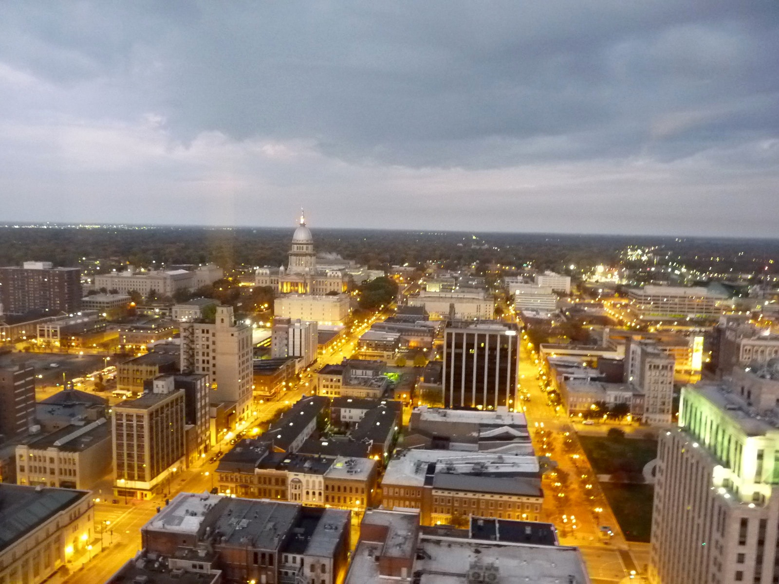 Springfield!